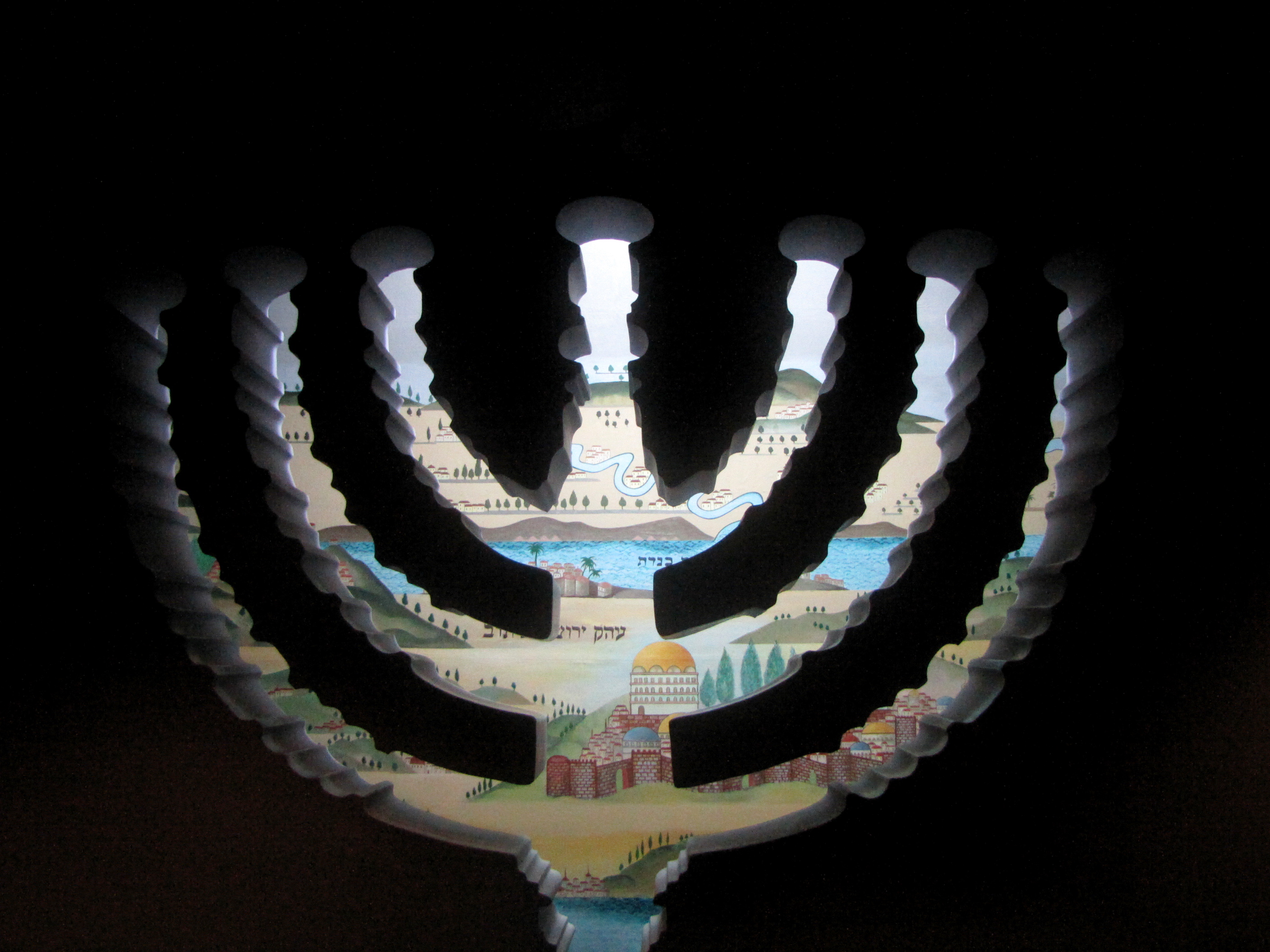 Beyt ha-Tefutsoth